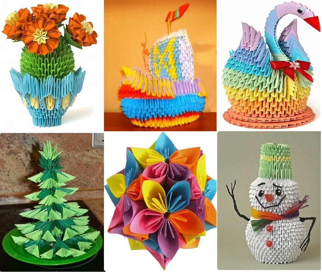 Օրիգամի առարկաներ